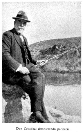 Cristóbal Jiménez y Encina pescando